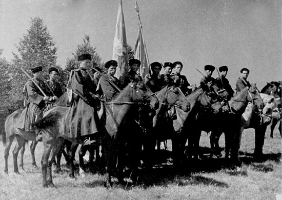 Казаки 10-й гвардейской казачьей кавалерийской Кубанско-Слуцкой Краснознамённой орденов Суворова, Кутузова и Богдана Хмельницкого дивизии. 1944 г.